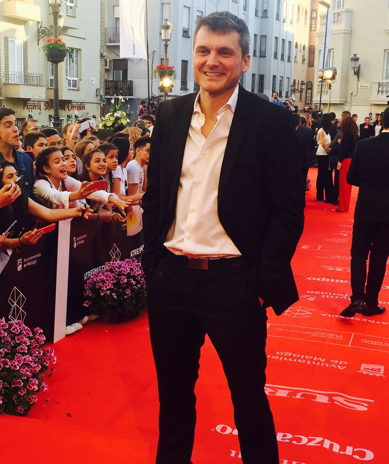 El actor malagueño Salva Reina en la 19 edición del Festival de Cine de Málaga (2016).